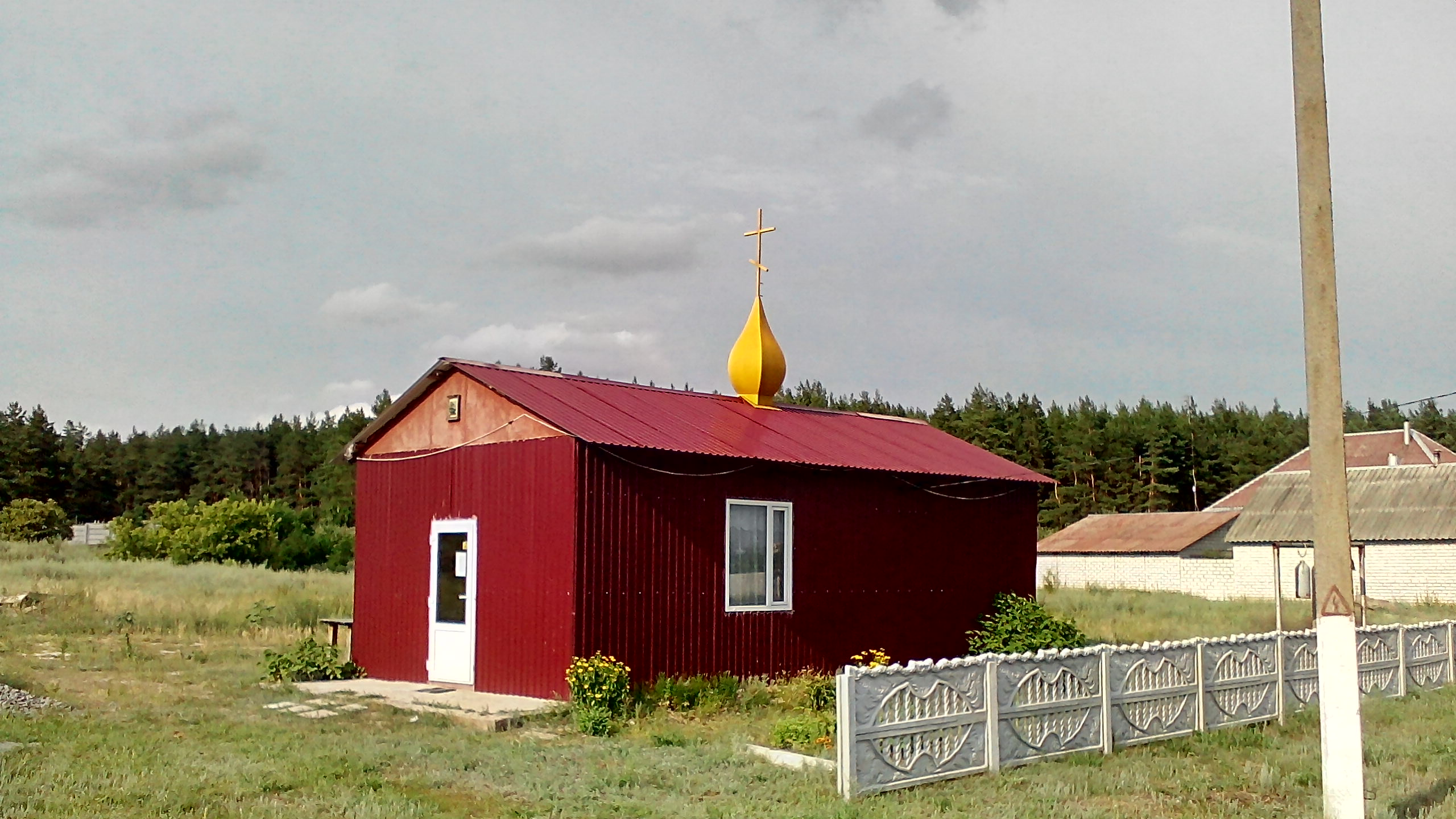 Україна, Харківська область, Зміївський район, село Чемужівка. Церква Дмитра Солунського. 2018